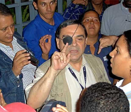 Imagen del Periodista e internacionalista Walter Martinez frente al canal de televisión Venezolana de Televisión (VTV).